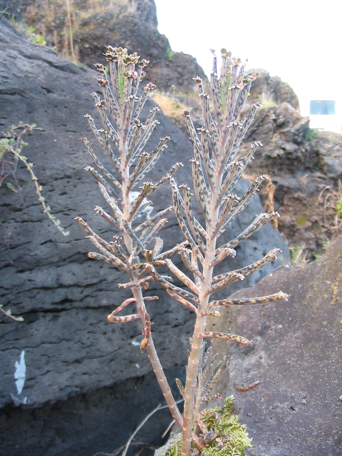 Kalanchoe delagoensis - Habitus